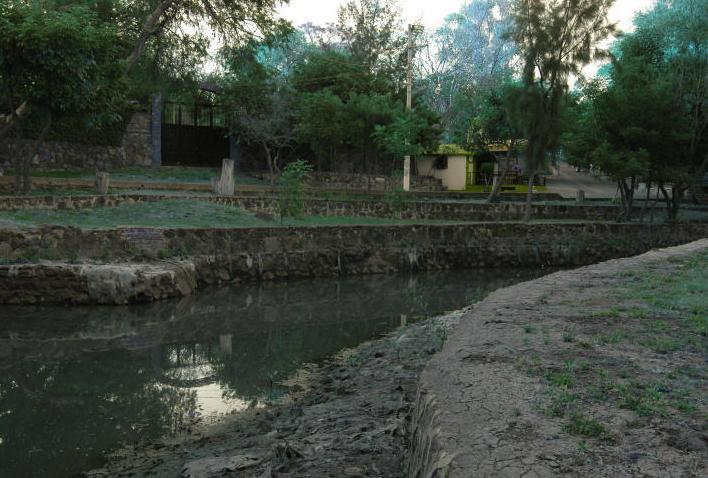 Charándaro en Uriangato